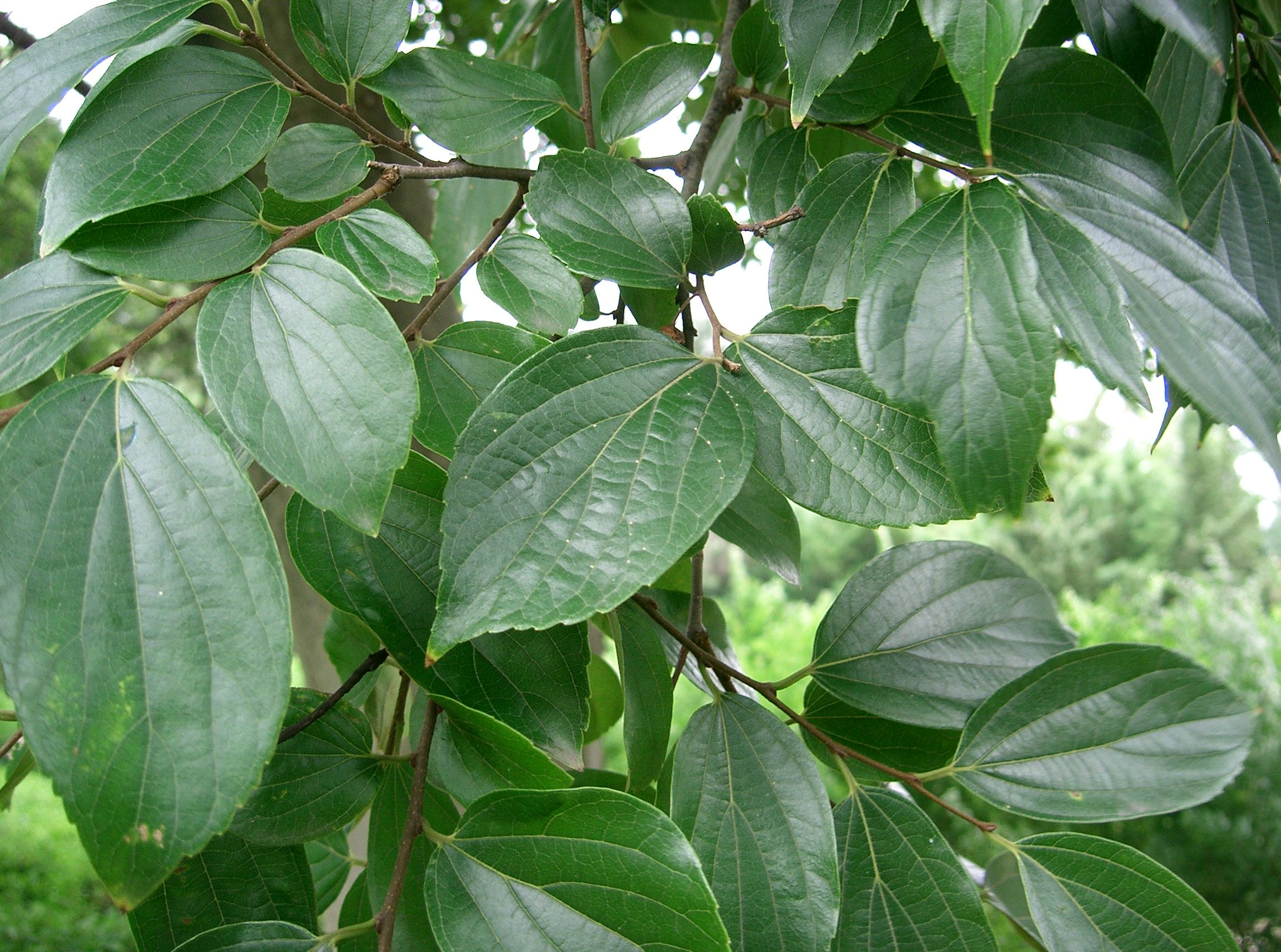 Scientific name Celtis sinensis var. japonica